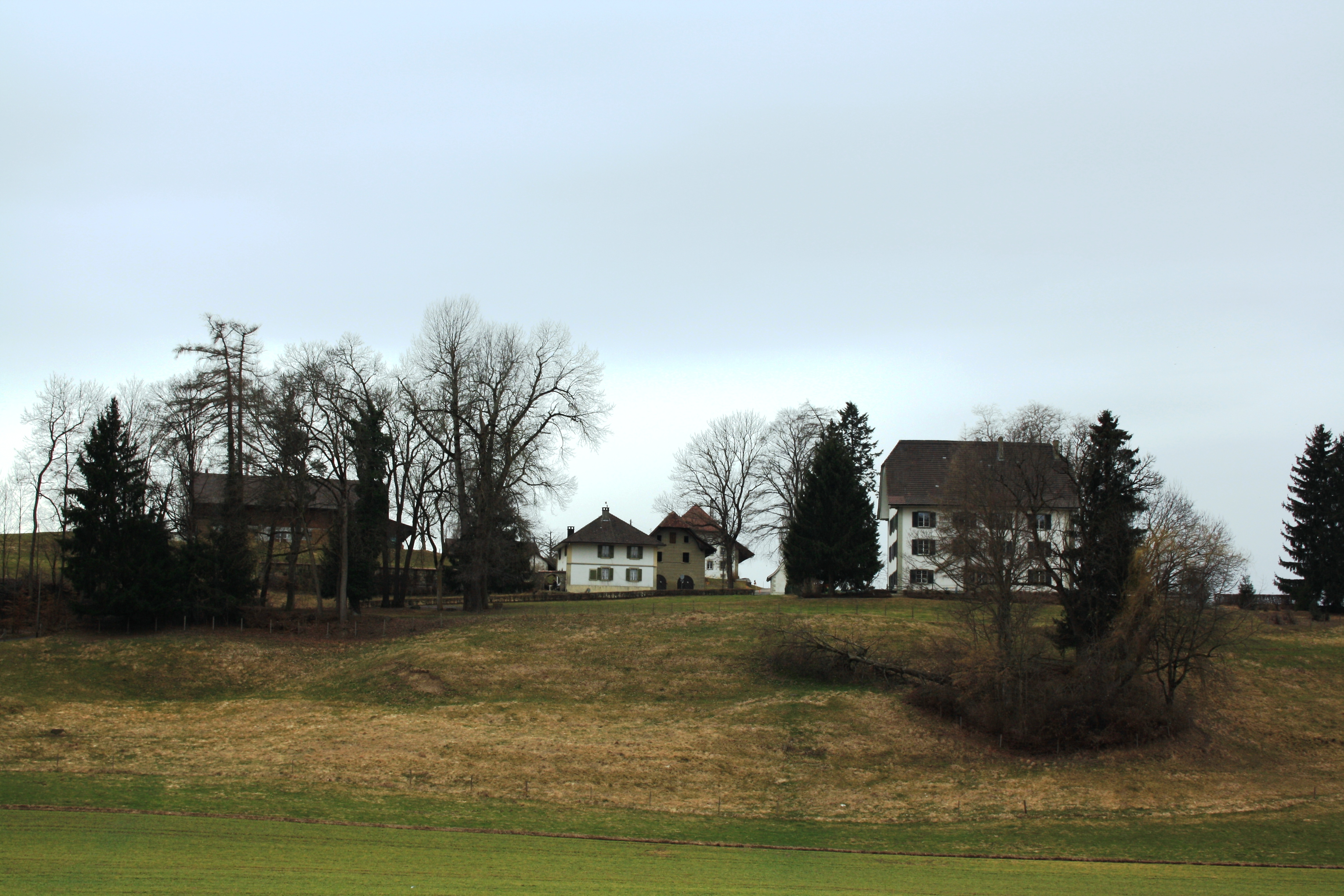 Maggenberg, Tafers, Kanton Freiburg, Schweiz